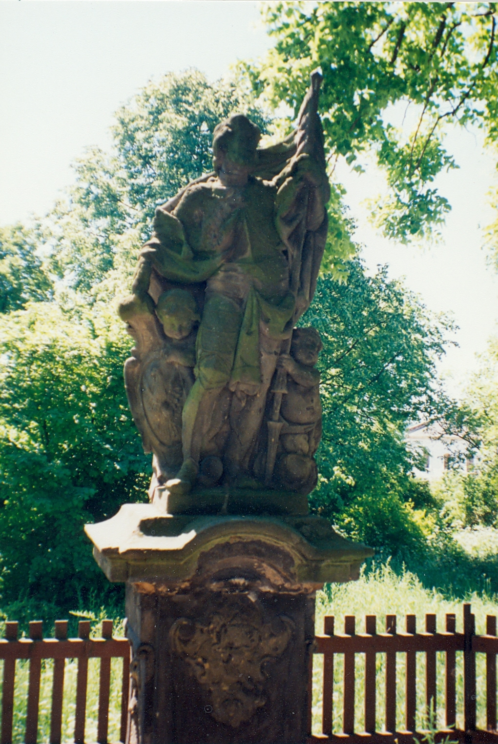 Socha sv. Václava (Vojničky), proti čp. 23, Vojničky